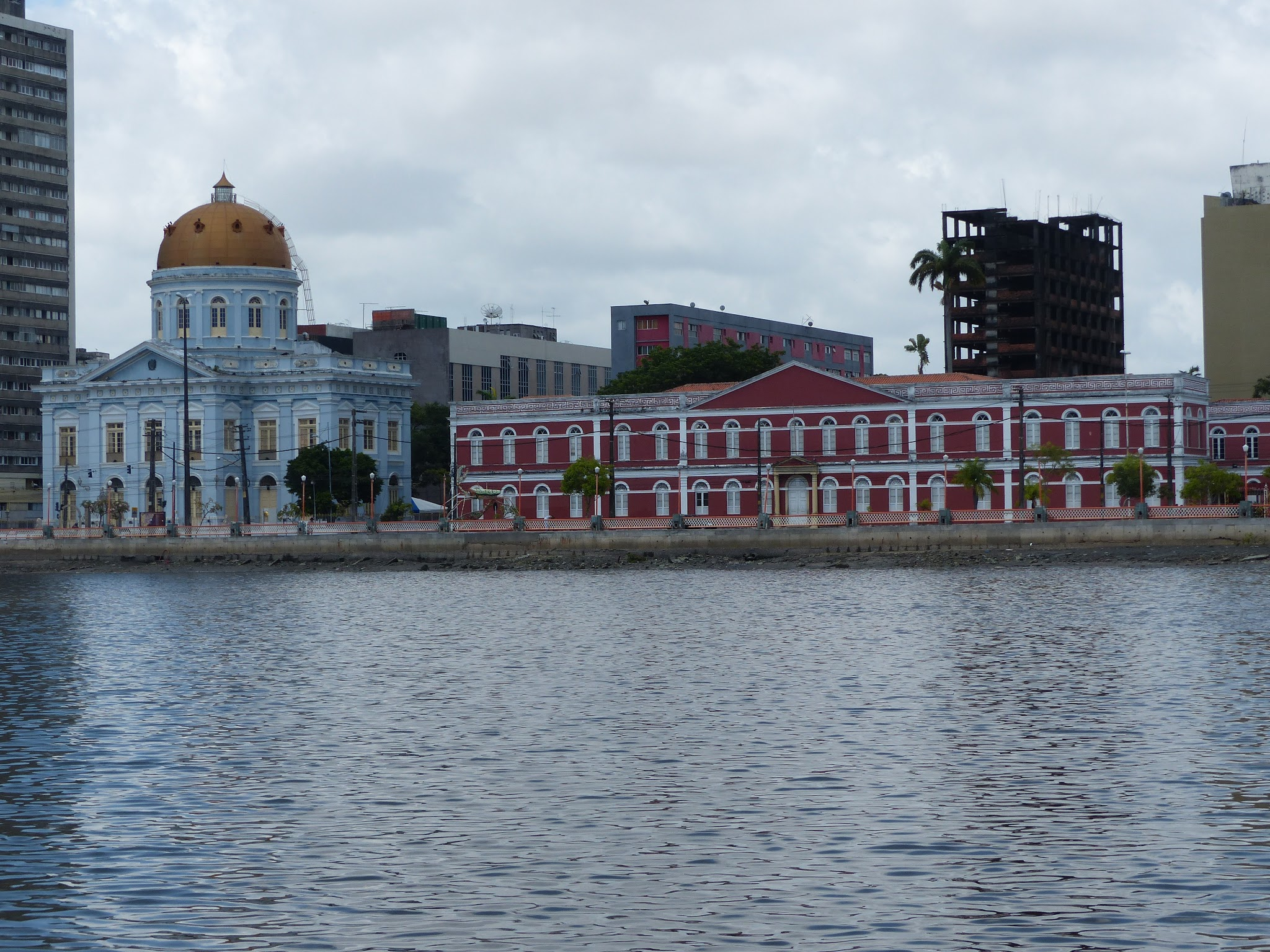 Rua da Aurora e rio Capibaribe Recife, Brasil Cultural property Rua da Aurora, Recife, Pernambuco, Brazil Q10364966, VIAF ID: 2501150325524910090003, P727: iPatrimônio ID: recife-conjunto-urbano-da-rua-da-aurora